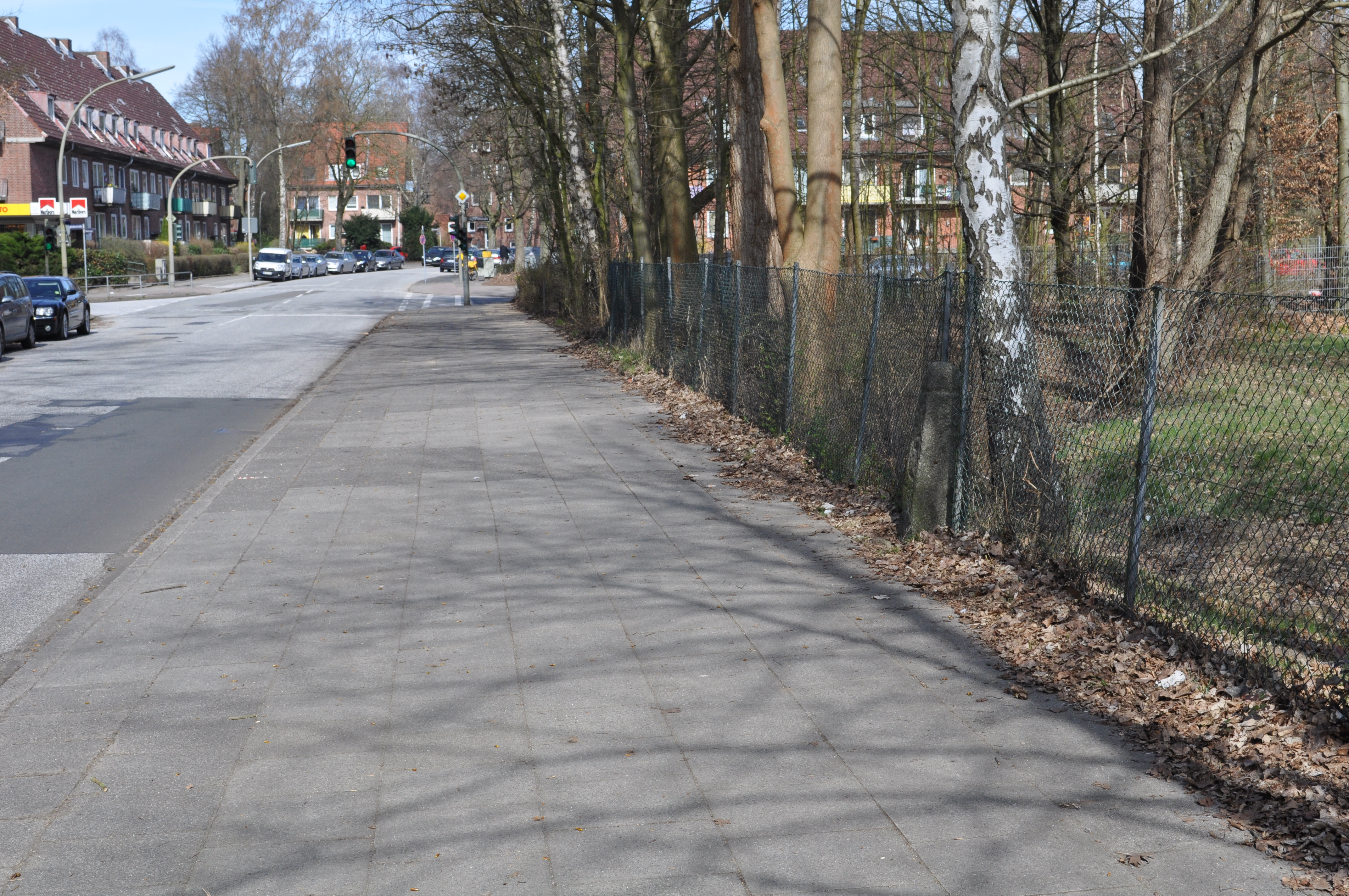 Grenzstein Nr. 4 des ehemals zur Herrschaft Pinneberg gehörenden Dorfes Hummelsbüttel an der heutigen Grenze der Hamburger Stadtteile Hummelsbüttel und FuhlsbüttelInschrift: HP / C7 / 1783 / No 4 (Herrschaft Pinneberg / Christian VII. / gesetzt 1783 / Grenzstein Nr. 4)